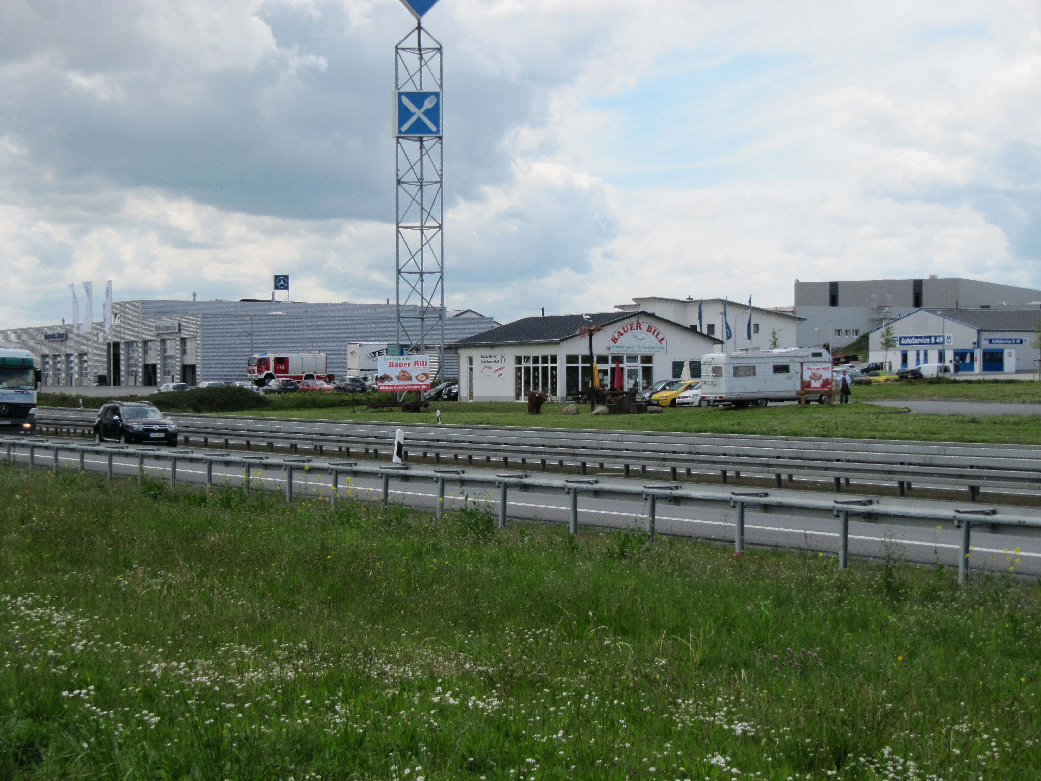 Obertiefenbach (Beselich) – Investzentrum an der B49